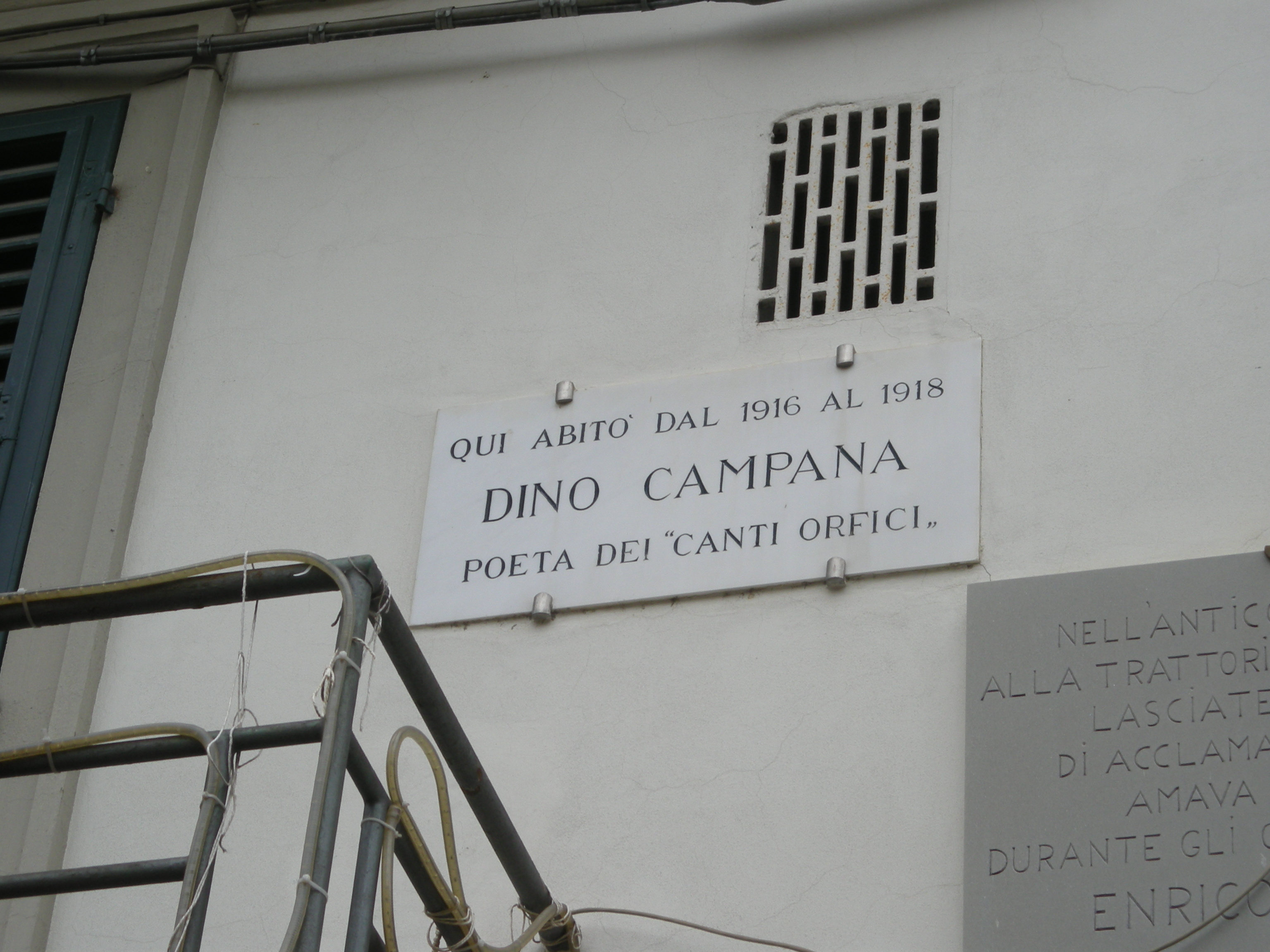 Targa sulla casa dove abitò Dino Campana a Lastra a Signa